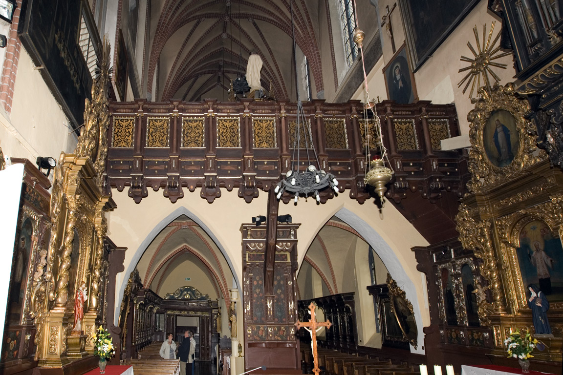 Chełmno, kościół klasztorny p.w. śś. Jana Chrzciciela i Jana Ewangelisty